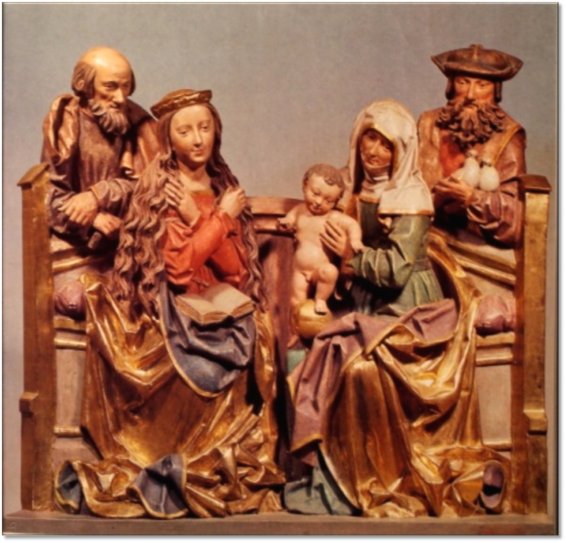 Am rechten Chorbogen der St. Nikolauskirche in Veringenstadt. Lindenholz, hinten ausgehöhlt, farbige Fassung z. T. neu. Höhe 95 cm, Breite 116 cm, Tiefe 21 cm. Bildhauer vermutlich Nikolaus Weckmann, Ulm, 1510. Im späten Mittelalter dehnte sich die Verehrung der jungfräulichen Gottesmutter Maria auch auf deren Mutter, die hl. Anna aus. Dies führte zu der beliebten Darstellung der Anna-selbdritt, also der beiden hl. Frauen mit dem Jesuskind in ihrer Mitte. Häufig wurde die Gruppe mit dem hl. Josef und dem hl. Joachim ergänzt. Sie versinnbildlicht das Glück der Familie, in der Gott daheim ist. Die Maria sitzt mit vor der Brust gekreuzten Armen da, ein aufgeschlagenes Buch auf dem Schoß, eine schlichte Krone auf dem Haupt. Ihre Augen sind sinnend vor sich gerichtet. Neben ihr die ebenfalls sitzende Mutter Anna im Kleid der Matrone, also mit Kopf- und Halsschleier. Mit beiden Händen hält sie das nackte Jesuskind, das mit dem rechten Füßchen auf der Bank steht, mit dem linken aber auf der Weltkugel balanciert, die im Mittelpunkt des Bildes liegt. Die Augen der Großmutter ruhen voller Güte und Milde auf dem Beter vor dem Altar. Hinter den beiden Frauen lehnen über einer Brüstung die beiden hl. Männer, Josef mit verschränkten Händen, kahlem Kopf und kurzem Bart, die idyllische Szene liebevoll betrachtend. Hinter der hl. Anna stützt sich der hl. Joachim mit breitem Barett auf dem Haupt und wirbelndem Barthaar, in der angewinkelten Linken zwei weiße Tauben haltend, das Opfer beim Tempelgang. Attributed to Niklaus Weckmann Alternative namesWeckmann, NikolausWork period1481–1526Work locationUlmAuthority control VIAF: 5733801 LCCN: nr94023526 GND: 119107392 RKD: 114578 WorldCat